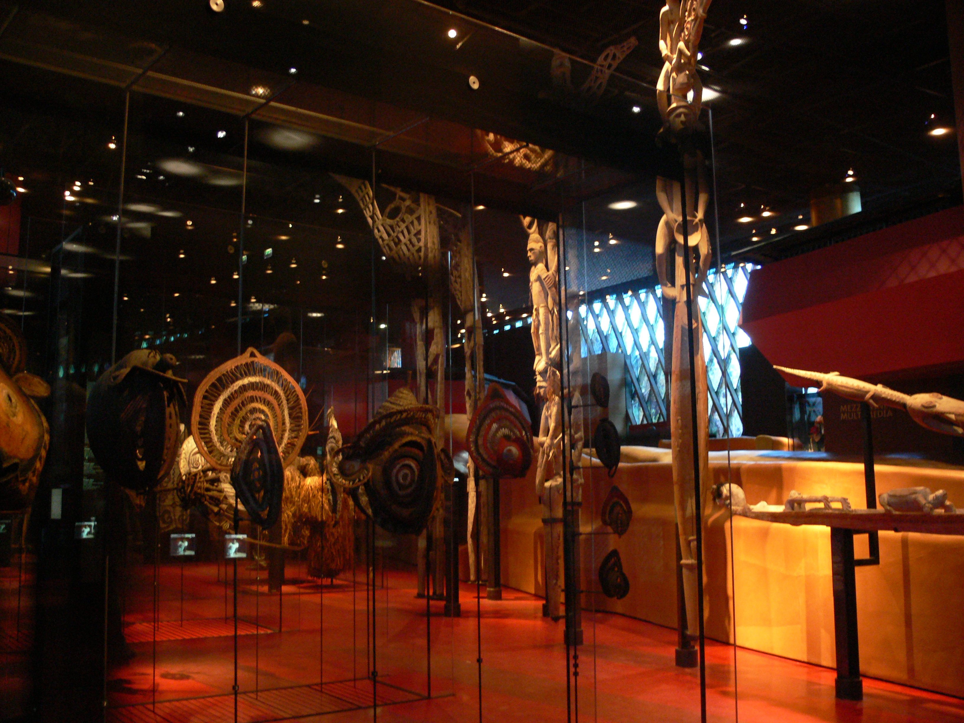 Exhibit at the Musée du quai Branly, Paris, France